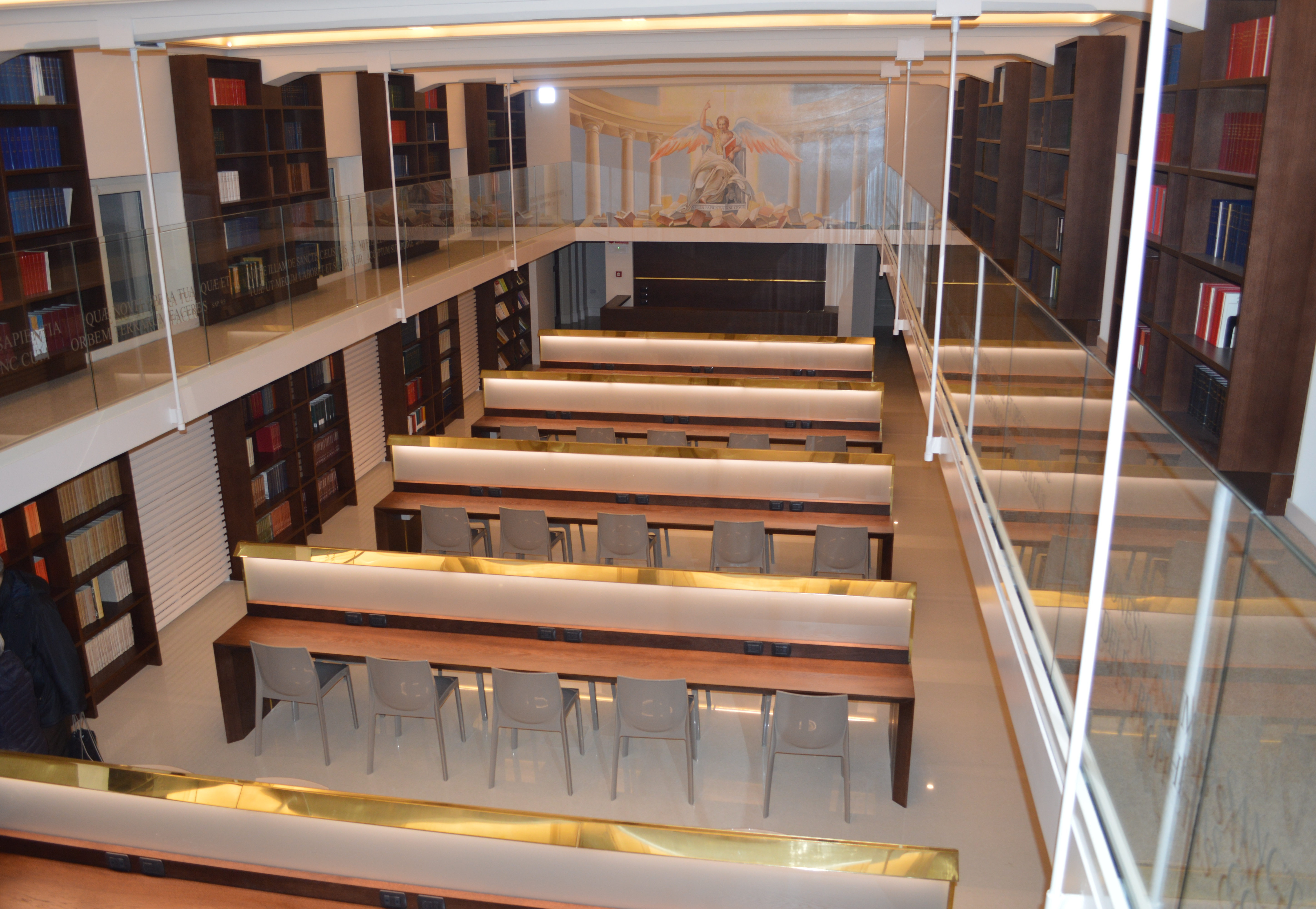 Biblioteca del Pontificio Seminario regionale Pugliese "Pio XI"